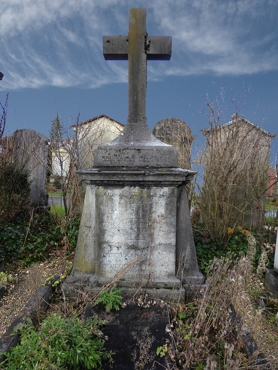 Fritz Fichter-Bernoulli (1869–1952), Chemiker, ordentlichen Professor für anorganische Chemie. Autor «Organische Elektrochemie», Redaktor und Gründer der Helvetica Chimica Acta, Friedhof Wolfgottesacker, Basel